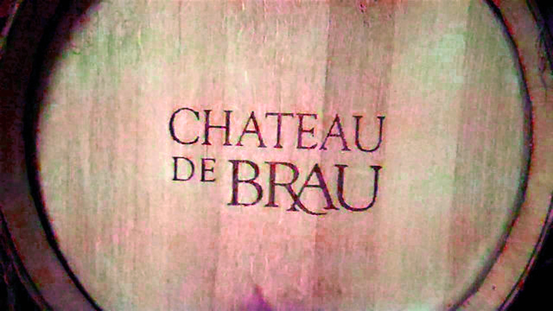 Barrique de fermentation pour le chardonnay au château de Brau en Cabardès